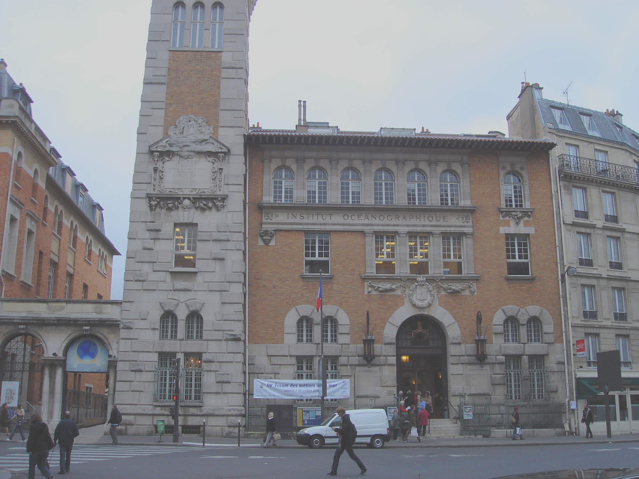 Institut d'Océanographie, Paris.